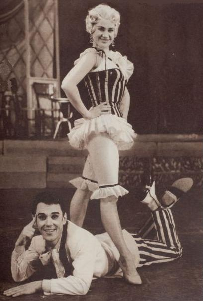 Сейя Силфверберг и Хейкки Вяртси